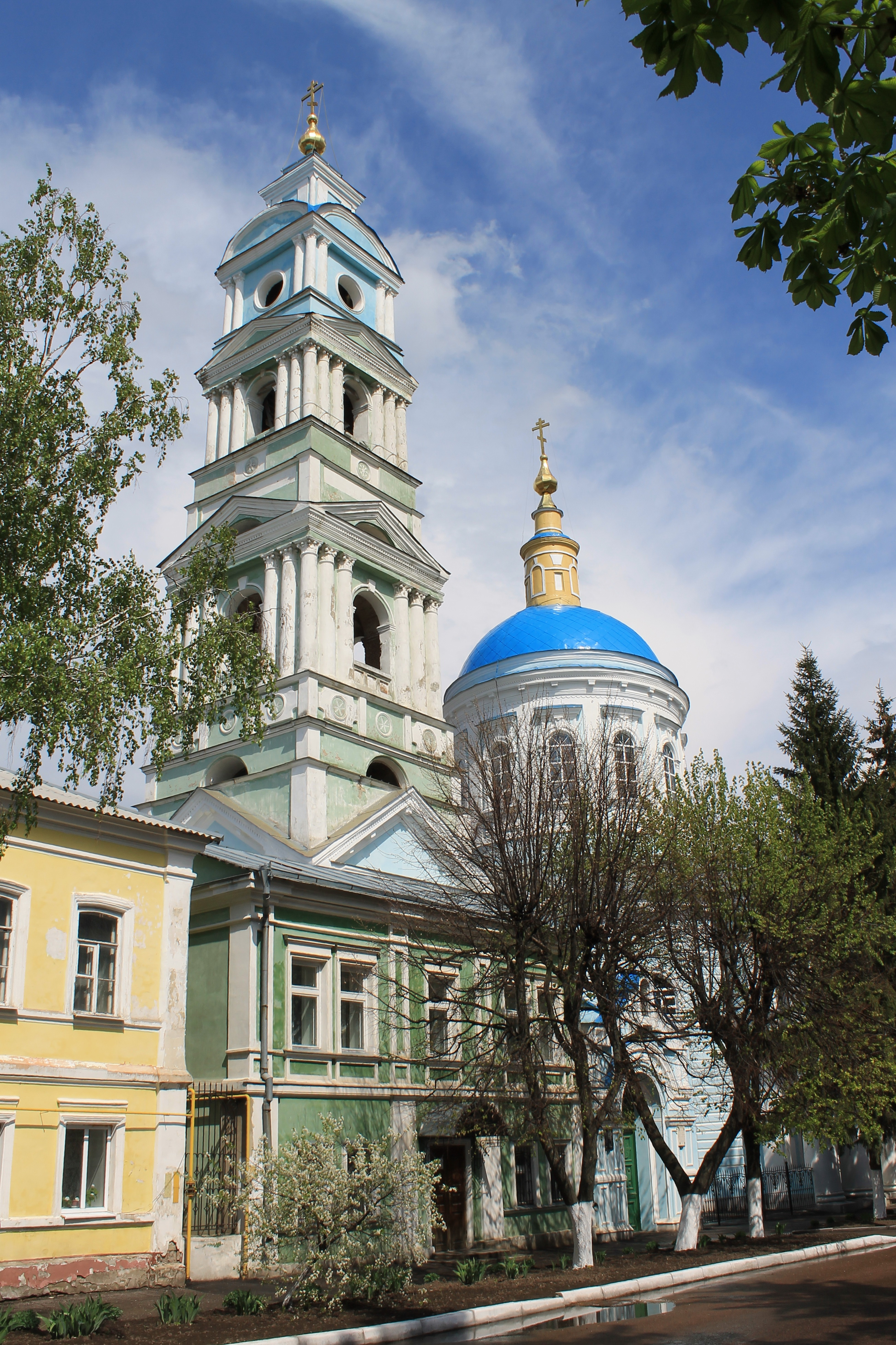 Колокольня Покровского храма в г. Рыльске Курской области. На переднем плане - двухэтажное здание воскресной школы